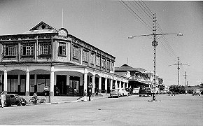 The Uganda Printers, Kampala Road, Kampala, Uganda